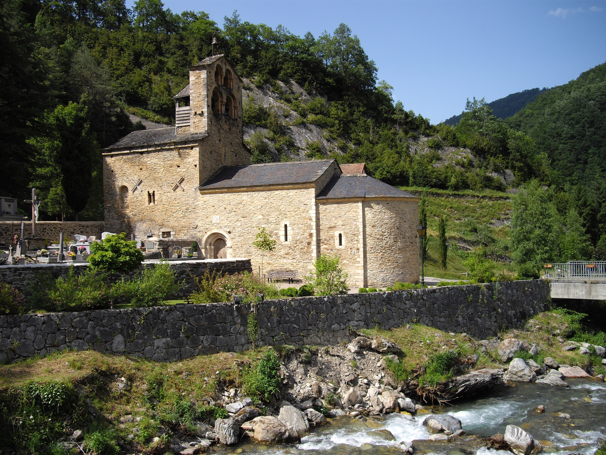 Église Notre-Dame de Salau (Couflens, Ariège, France)